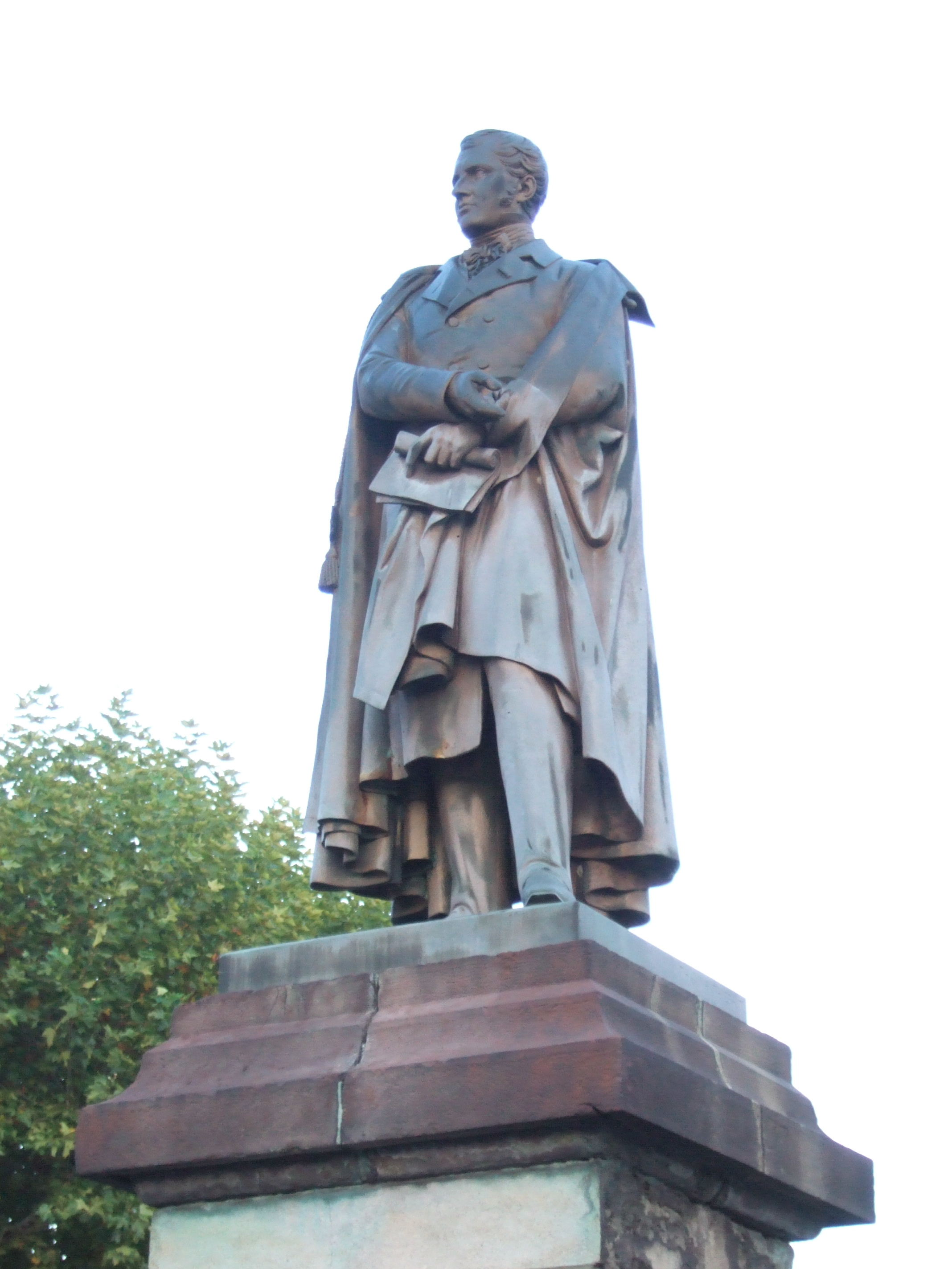 Statue du Duc Decazes sur la place Decazes à Decazeville